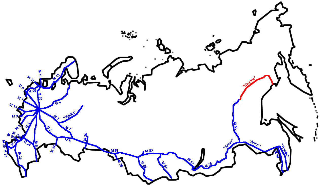 Magistrale "Kolyma" im russischen Fernstraßennetz